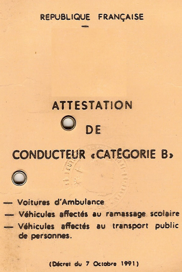 Attestation de conducteur B pour la conduite en France des véhicules spécialement aménagés: Voiture d'ambulance Voiture de ramassage scolaire Voiture de transport public de personnes.